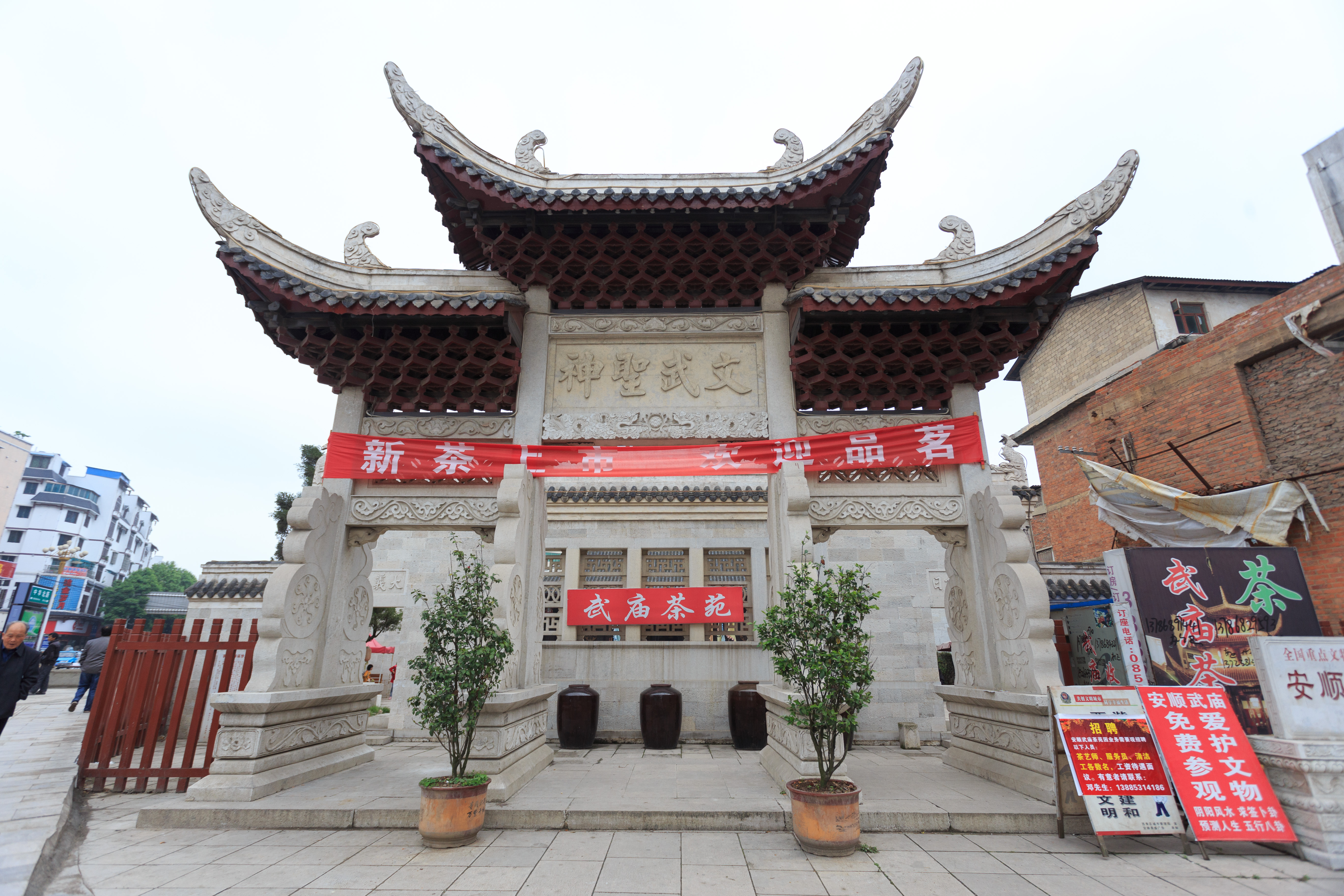 安顺武庙—— 牌坊大门